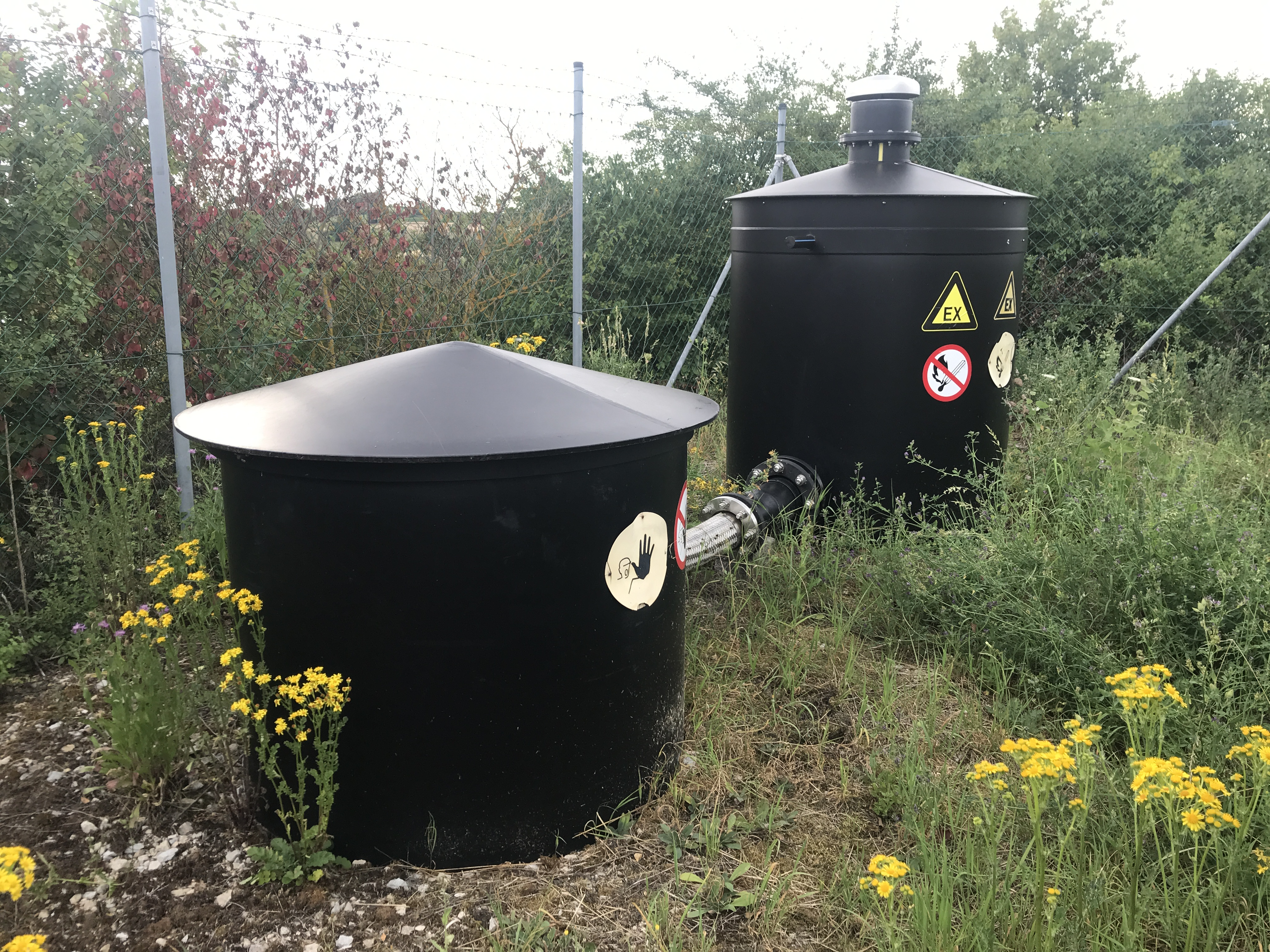 Gasbrunnen auf der renaturierten ehemaligen Hausmülldeponie am Rothofer Weg bei Bamberg-Gaustadt.